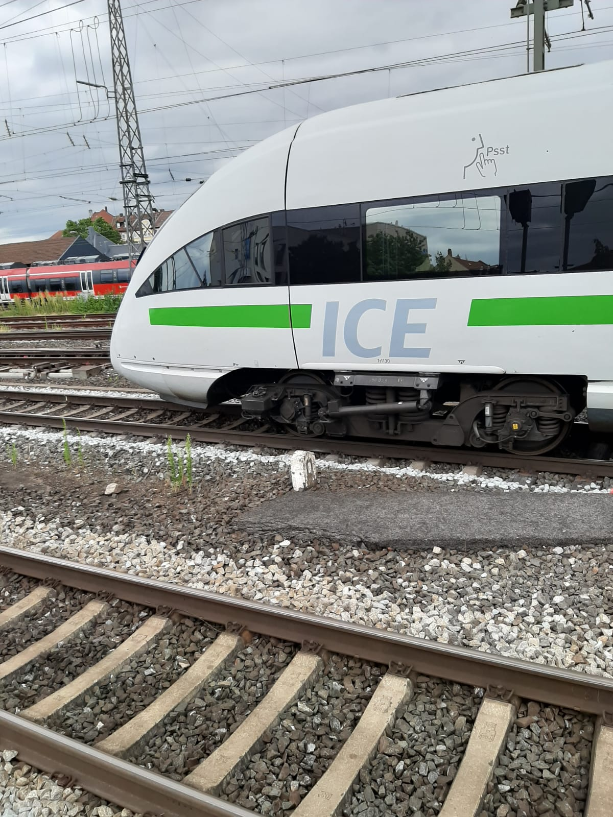 Logo mit grünem Balken des Intercity-Express